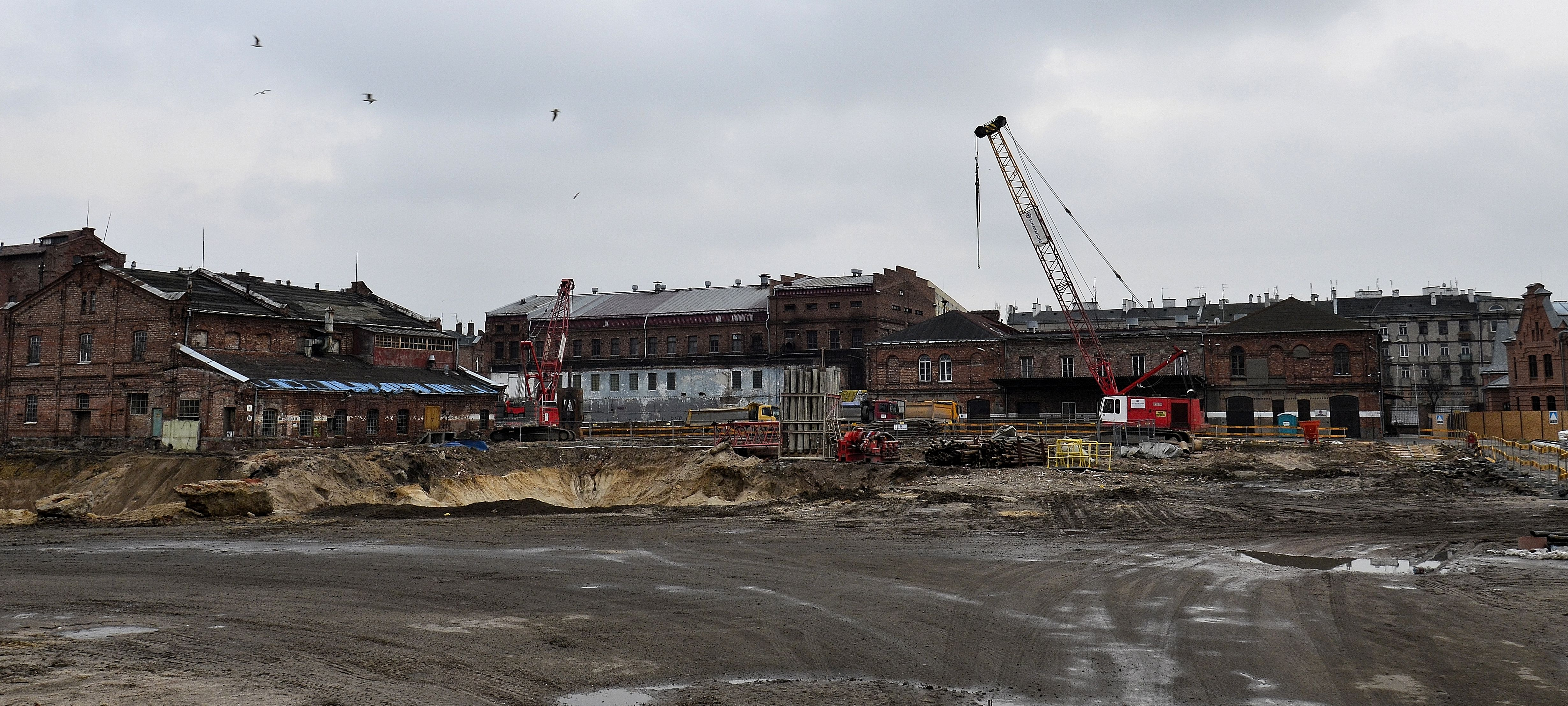 Dawna Fabryka Wódek Koneser, widok od strony ul. Białostockiej